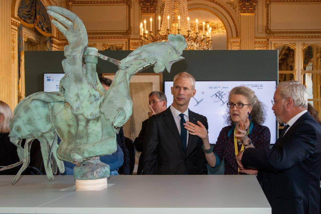 Trésors de Notre-Dame de Paris exposés au ministère de la Culture